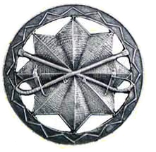 Odznaka Związku Strzeleckiego popularny Parasol